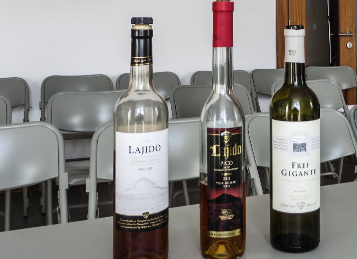 Weissweine der Weinbaugenossenschaft CIVP bei Criaçao Velha. Ein normaler Weisswein wie auch zwei, durch Alkohol angereicherte likörartige Weissweine.